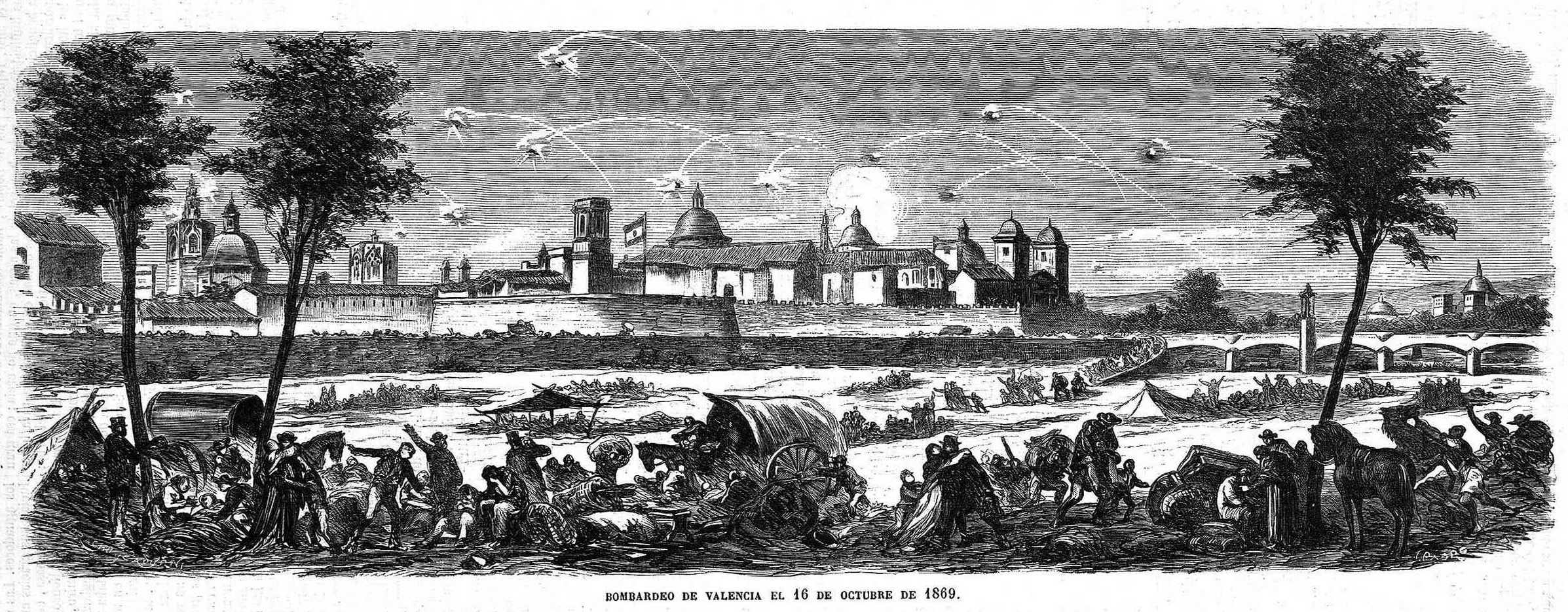 «Bombardeo de Valencia el 16 de octubre de 1869», 25 de septiembre de 1969, en la revista española El Museo Universal.